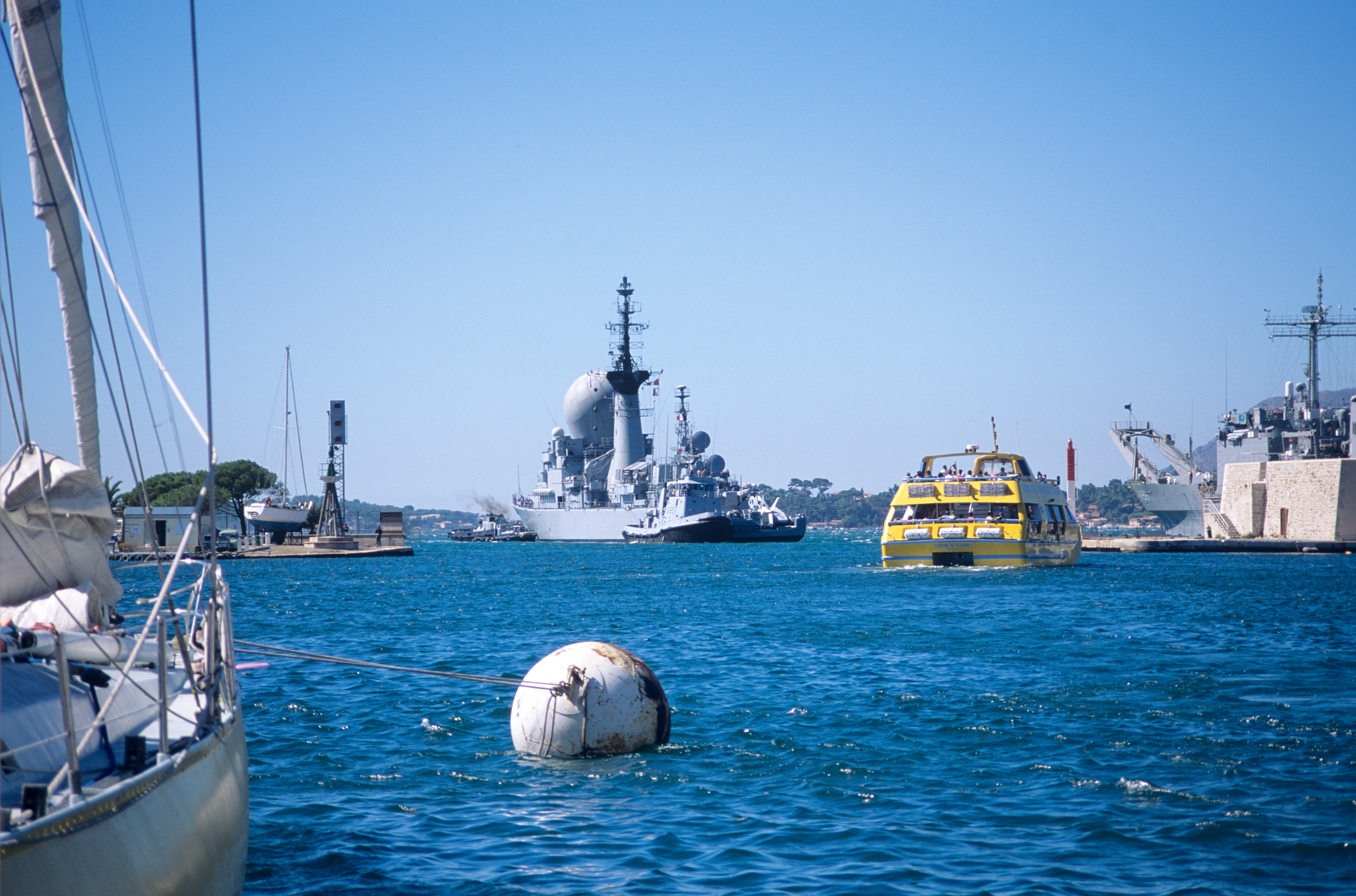 L’entrée du Port de Toulon. Sur cette photographie (prise depuis le Quai de Cronstadt), on peut voir, en jaune, le bateau de promenade en mer « Côte d’Azur I » et à l’arrière plan la frégate lance-missiles « Suffren » D 602 en train d’être remarquée. Toulon, Var, France.